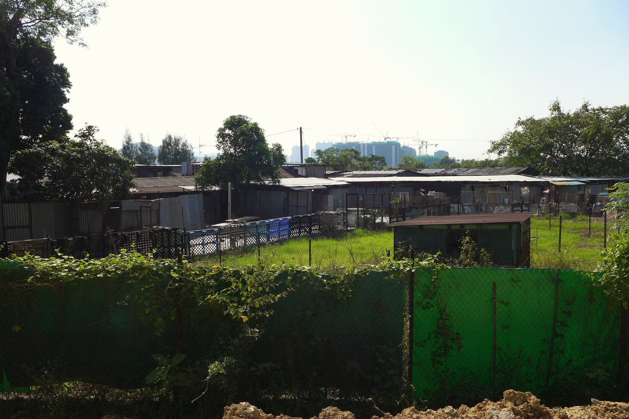 Fung Kat Heung